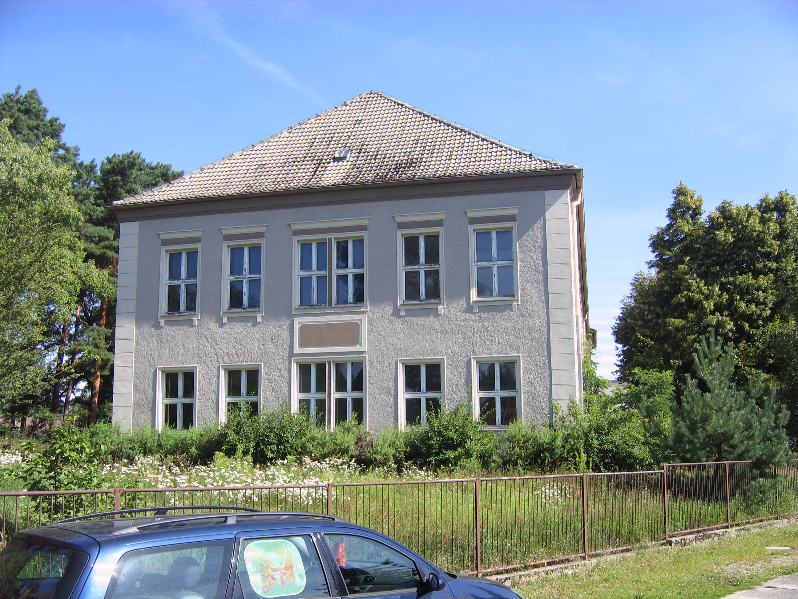 historisches Schulgebäude der ehemaligen Bezirksparteischule "M. Kalinin" in Cottbus